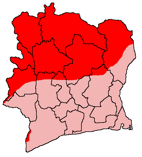 Le territoire controlé par les rebelles en mai 2005. Les informations sont d'après le BBC, mais c'est moi qui ai dessiné cette carte (à partir de l'Image:Cote d'Ivoire.png). QuartierLatin1968 05:32, 13 February 2006 (UTC)